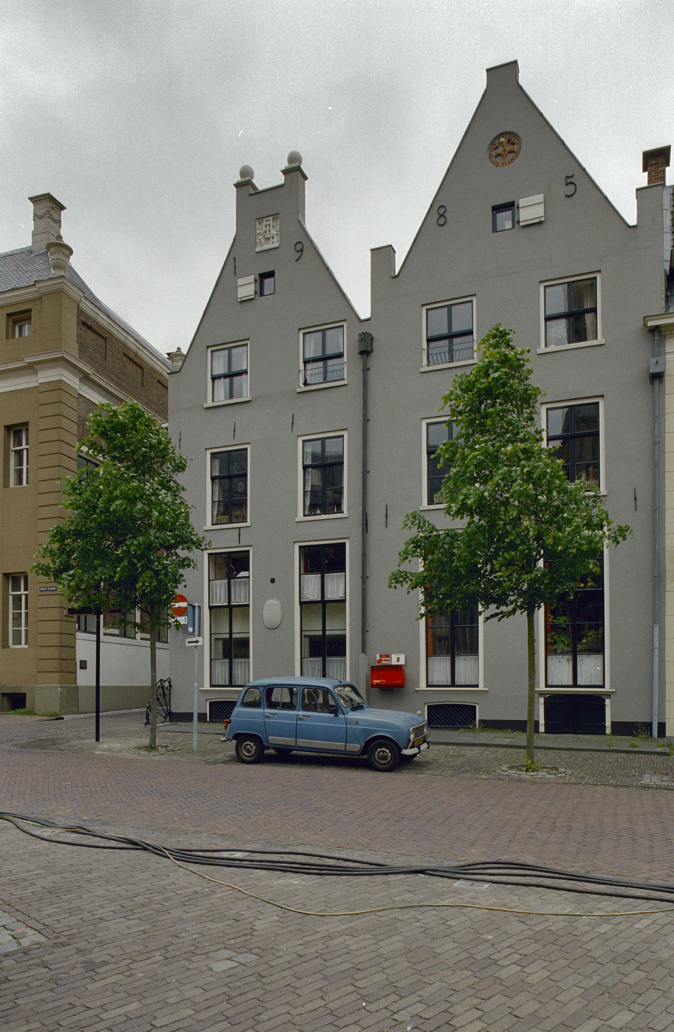 Overzicht voorgevels op de hoek Polstraat (opmerking: Opnamen zijn gemaakt i.v.m. kleurenaspecten)